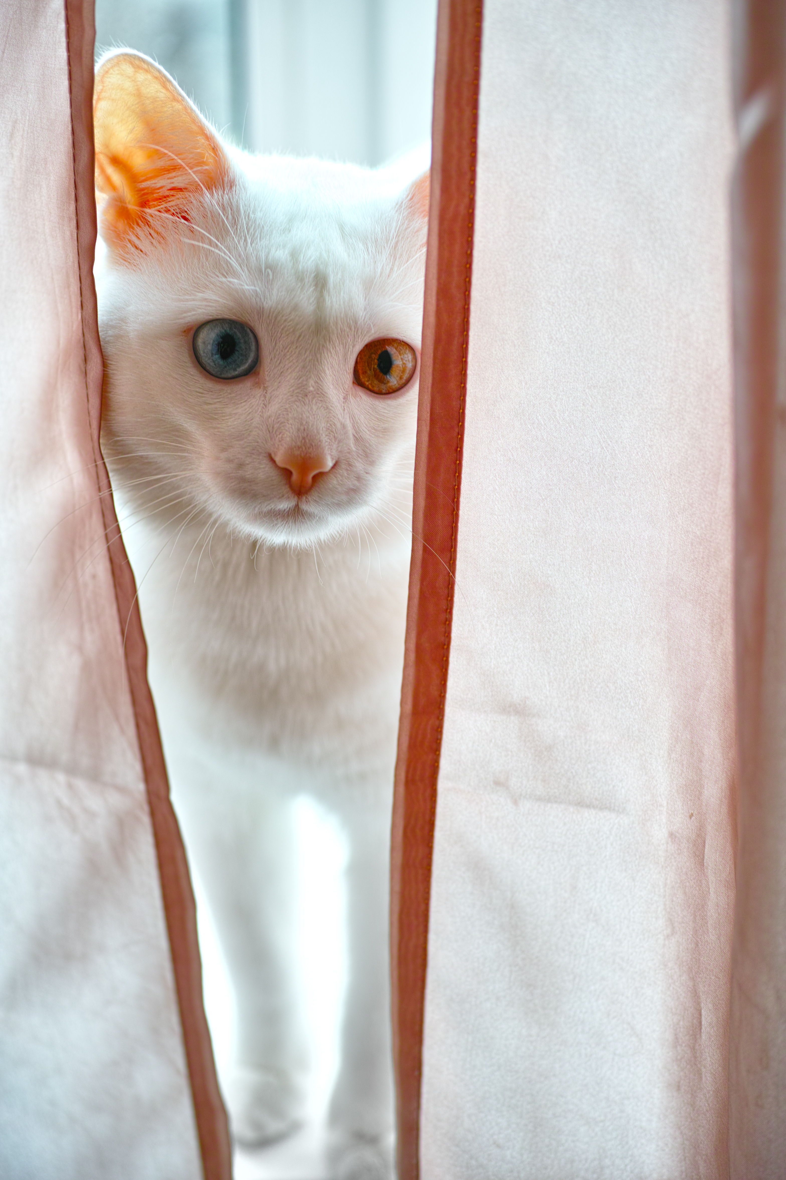 гетерохромия у кошки